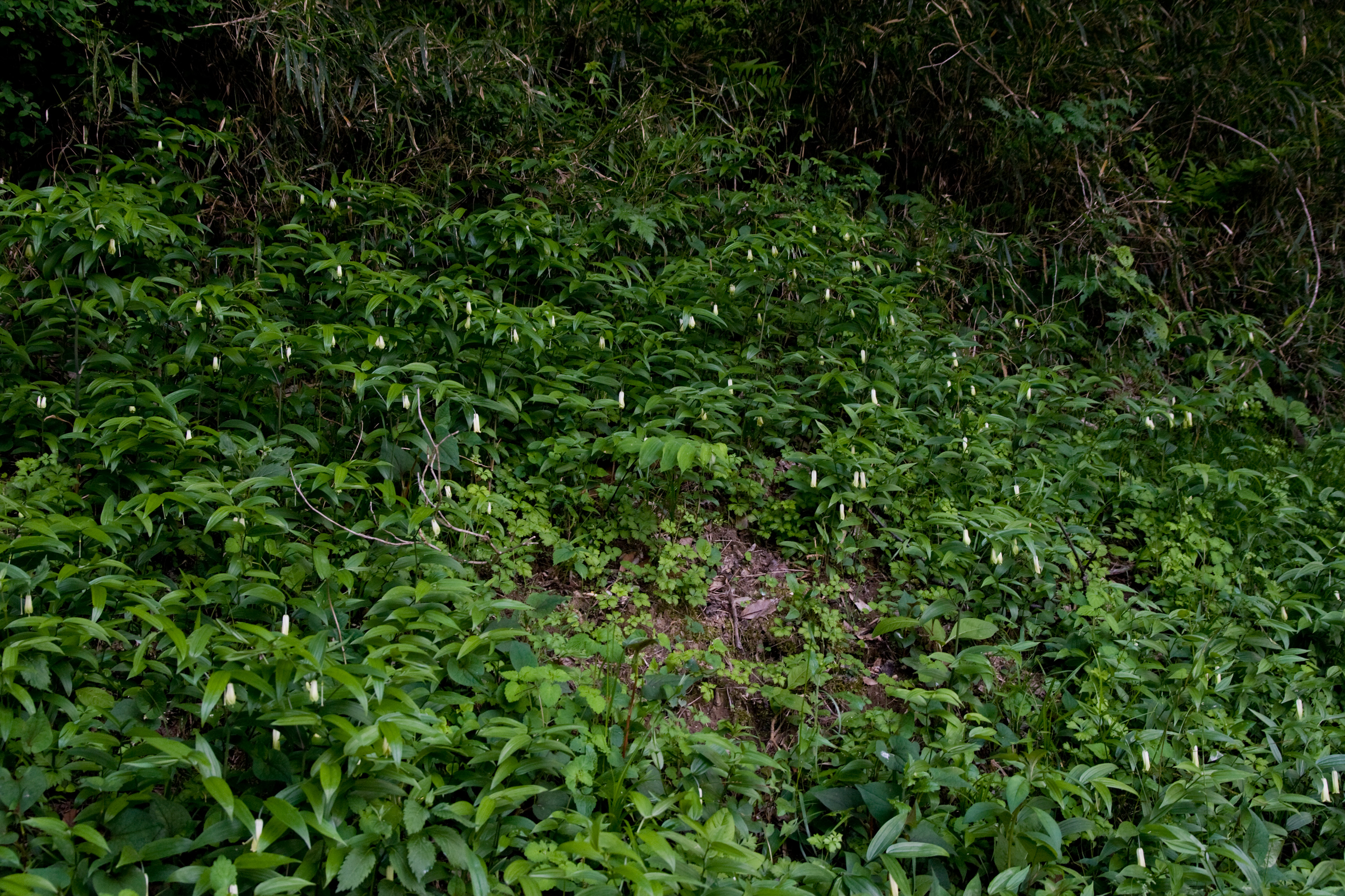 ホウチャクソウ (学名:Disporum sessile)